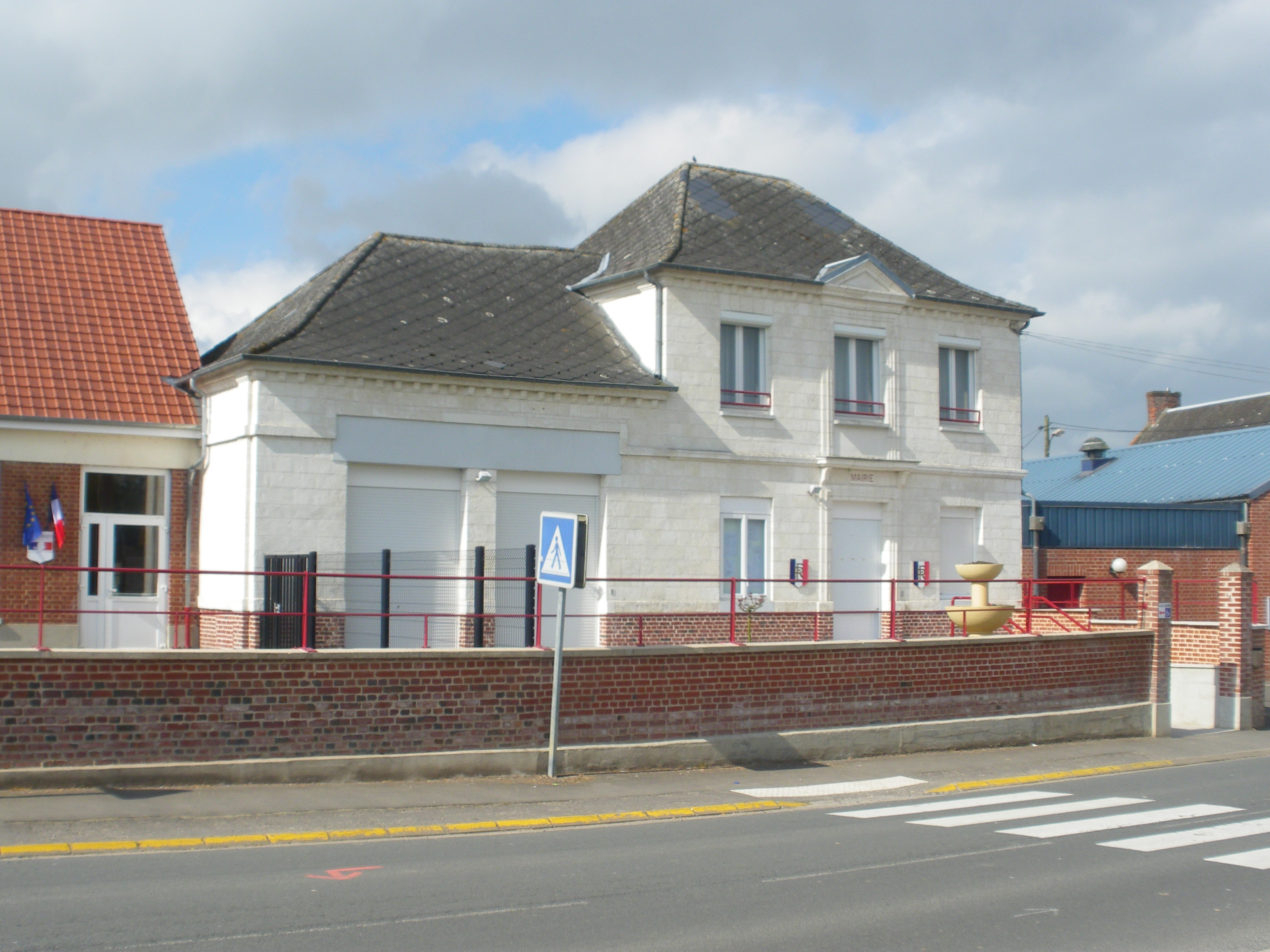 Vue de la mairie de la commune de Hauteville (Pas-de-Calais).